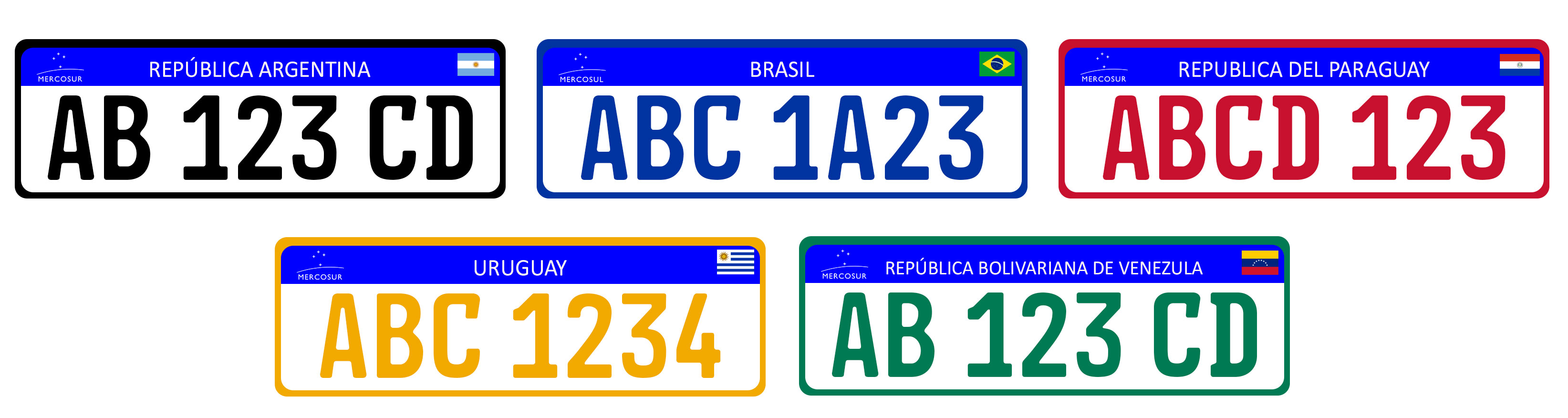 Placas de veículos dos países que compõe o MERCOSUL.